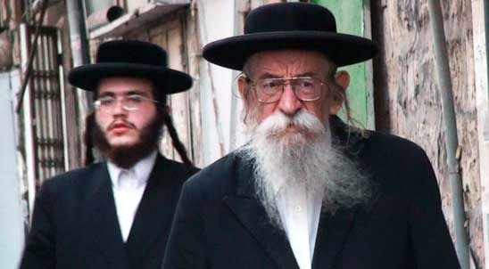 Judios ortodoxos en Measharim, barrio religioso de Israel